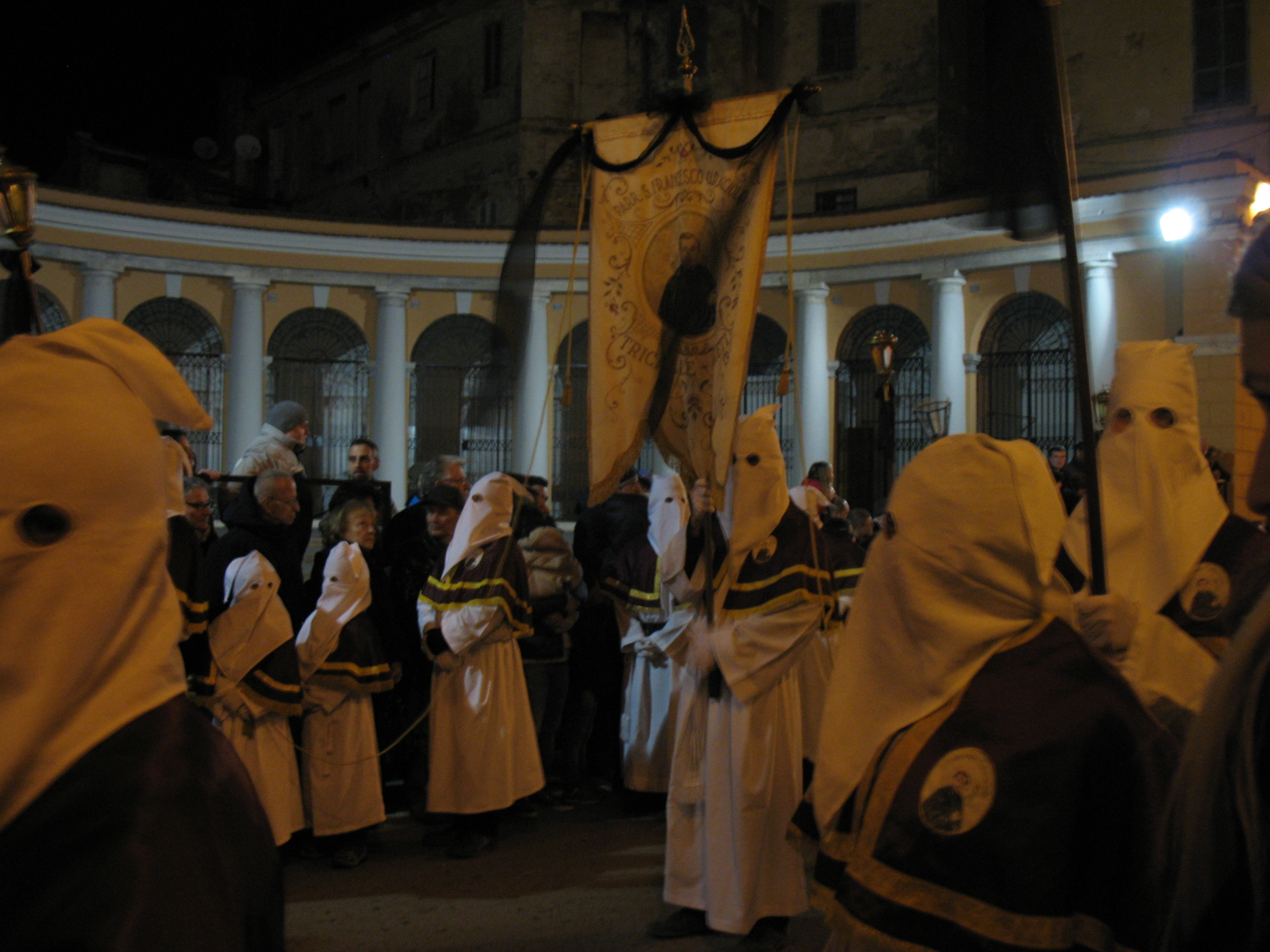 Confraternita della Processione del Venerdì Santo di Cheti